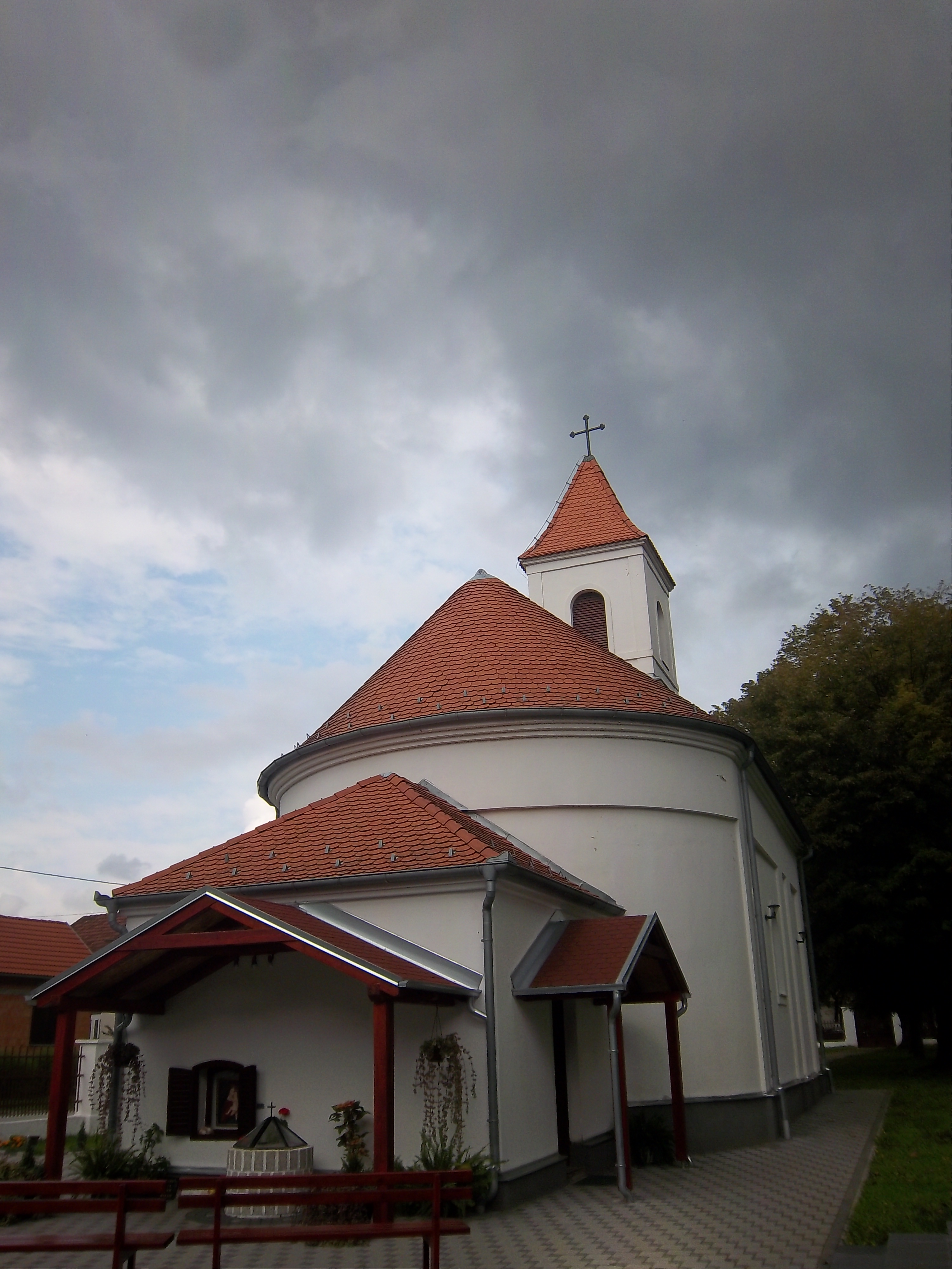 Српски (ћирилица): Светиште Госпе илачке (Република Хрватска)